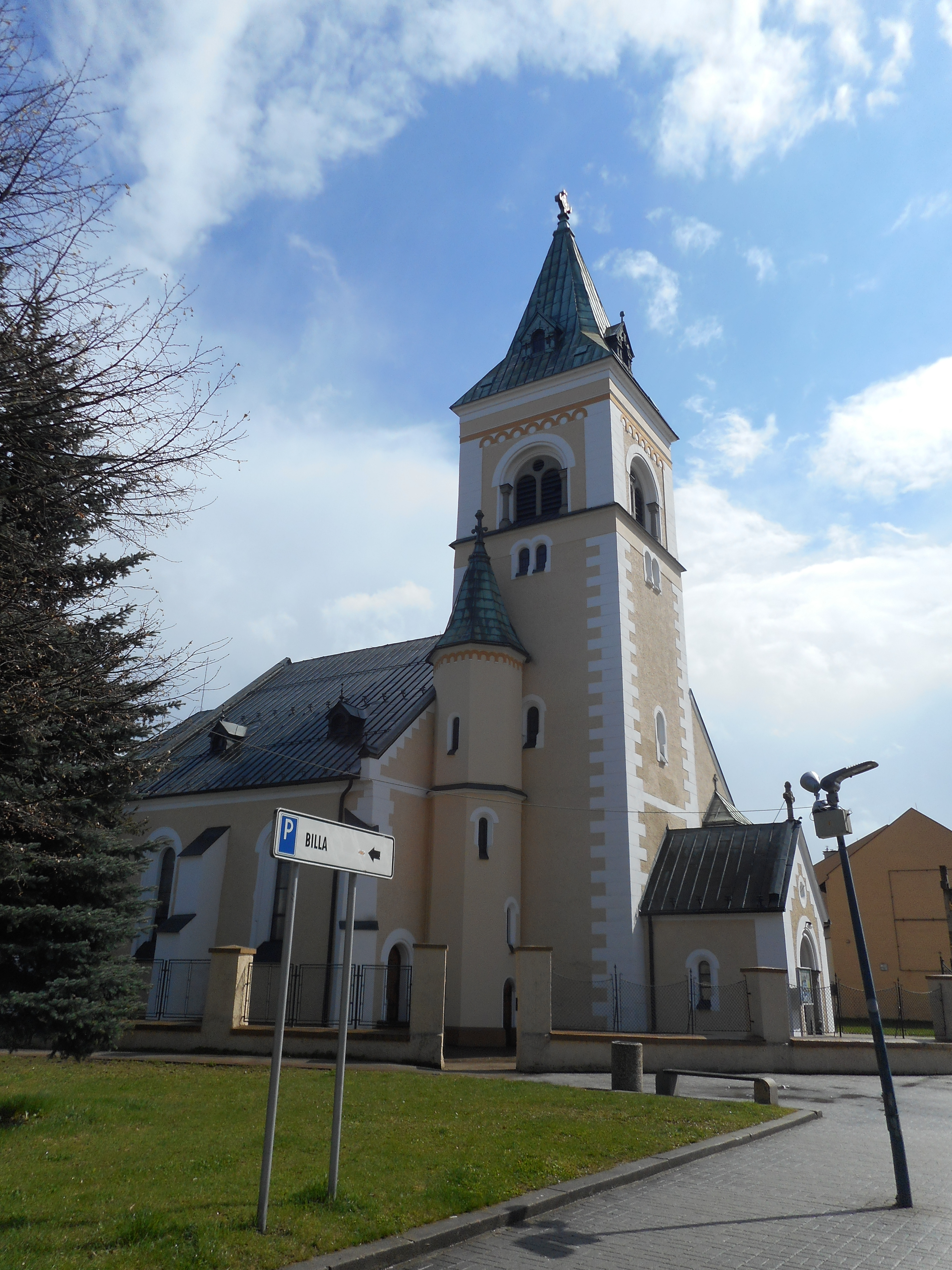 Kysucké Nové Mesto - kościół rzymskokatolicki pw. św. JakubaSlovenčina: Kostol sv. Jakuba